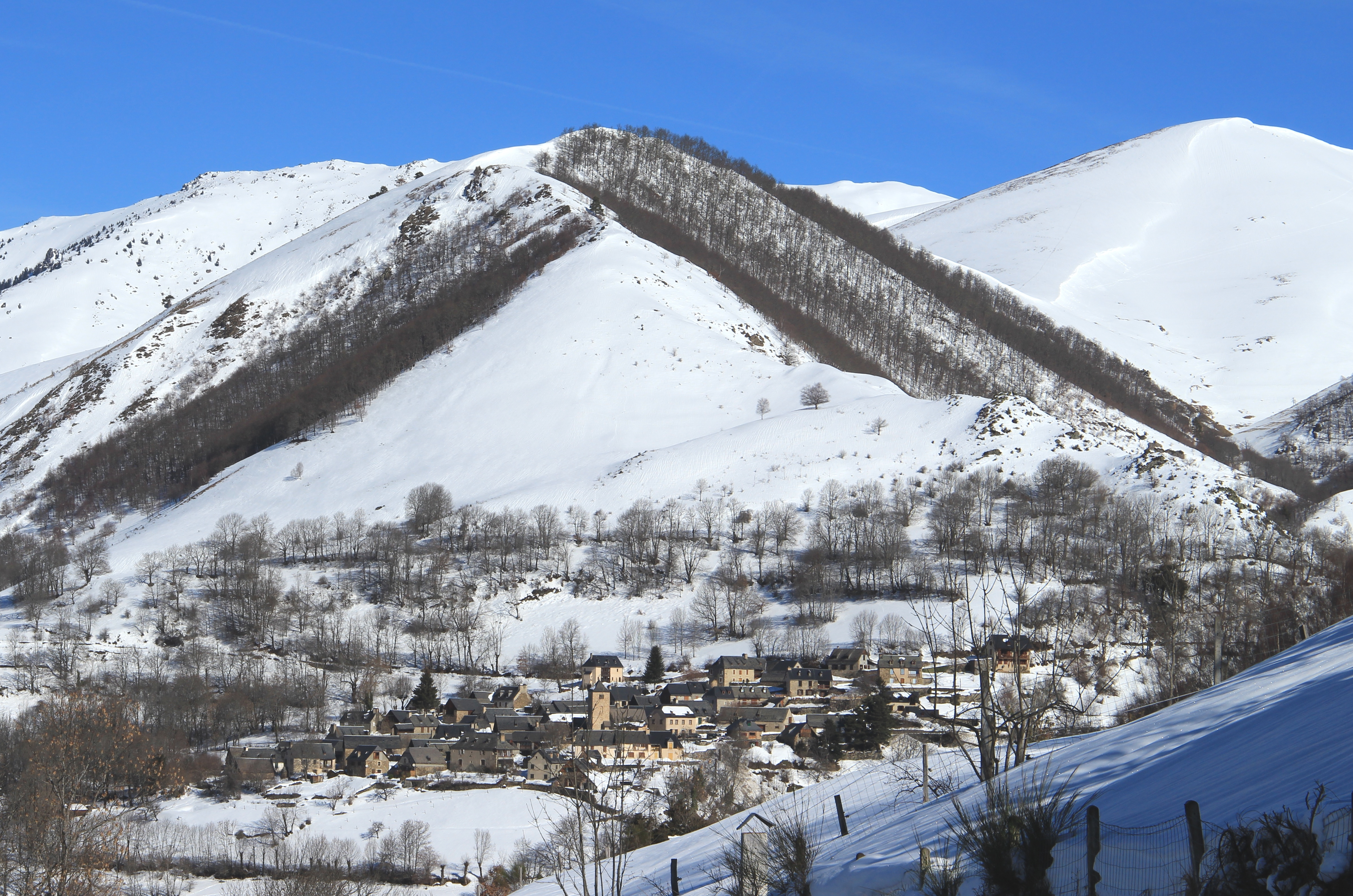 Mont (Hautes-Pyrénées)